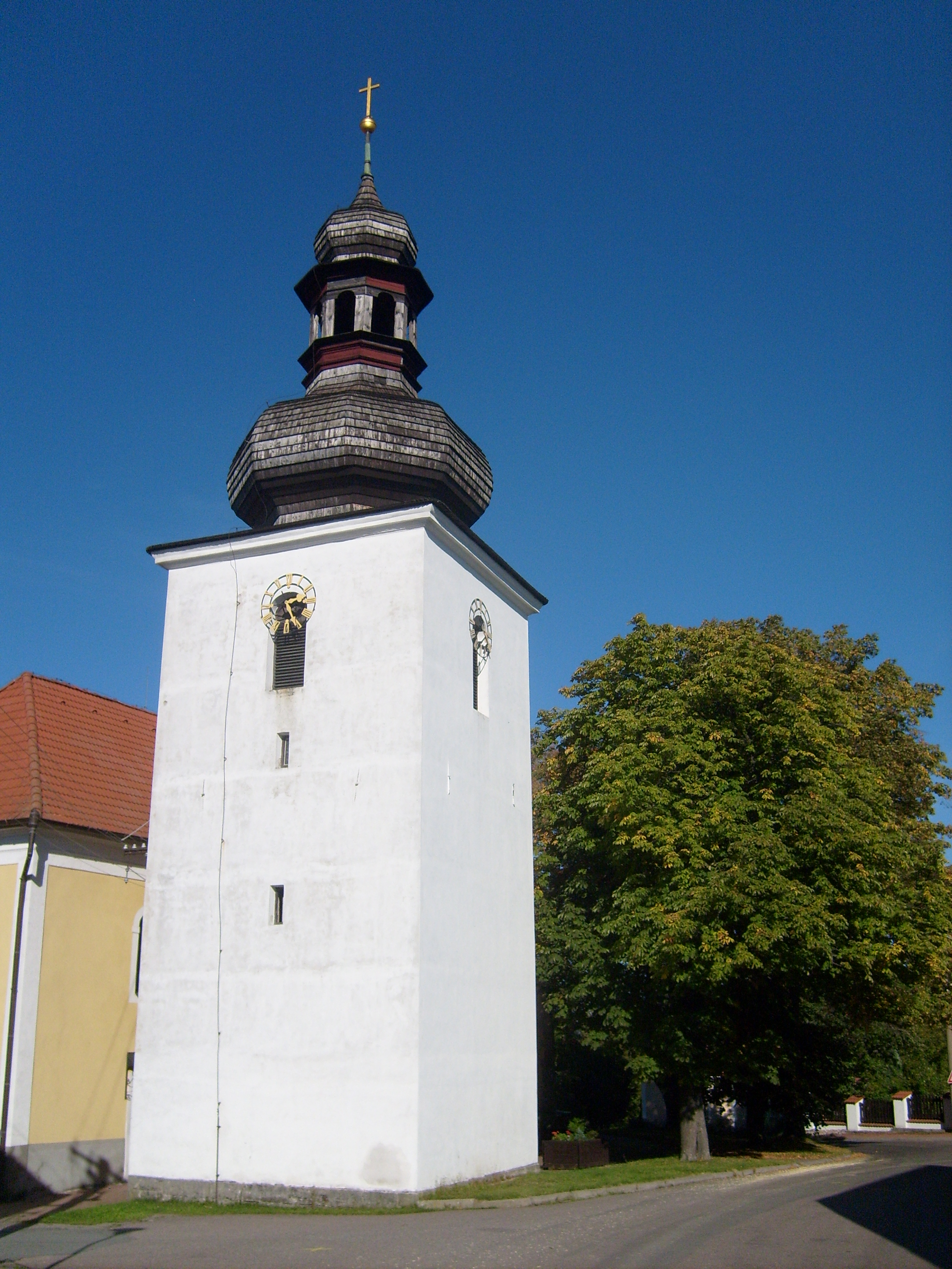 Kostel v Licibořicích, Chrudim District, Pardubice Region, Czech Republic